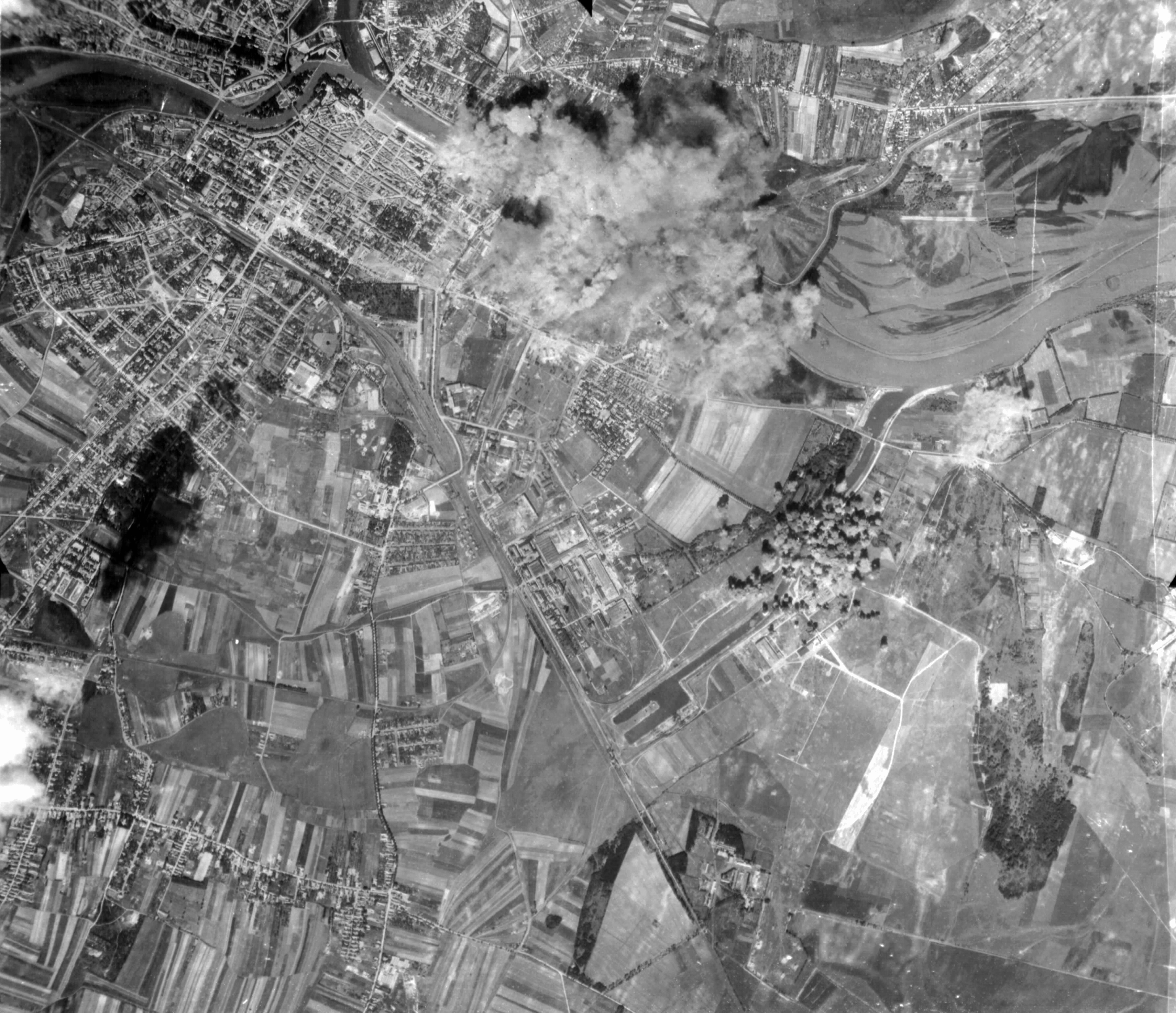 a Magyar Vagon és Gépgyár épületeinek bombázása. Location: Hungary, Győr Tags: second World War, bombing Title: a Magyar Vagon és Gépgyár épületeinek bombázása.